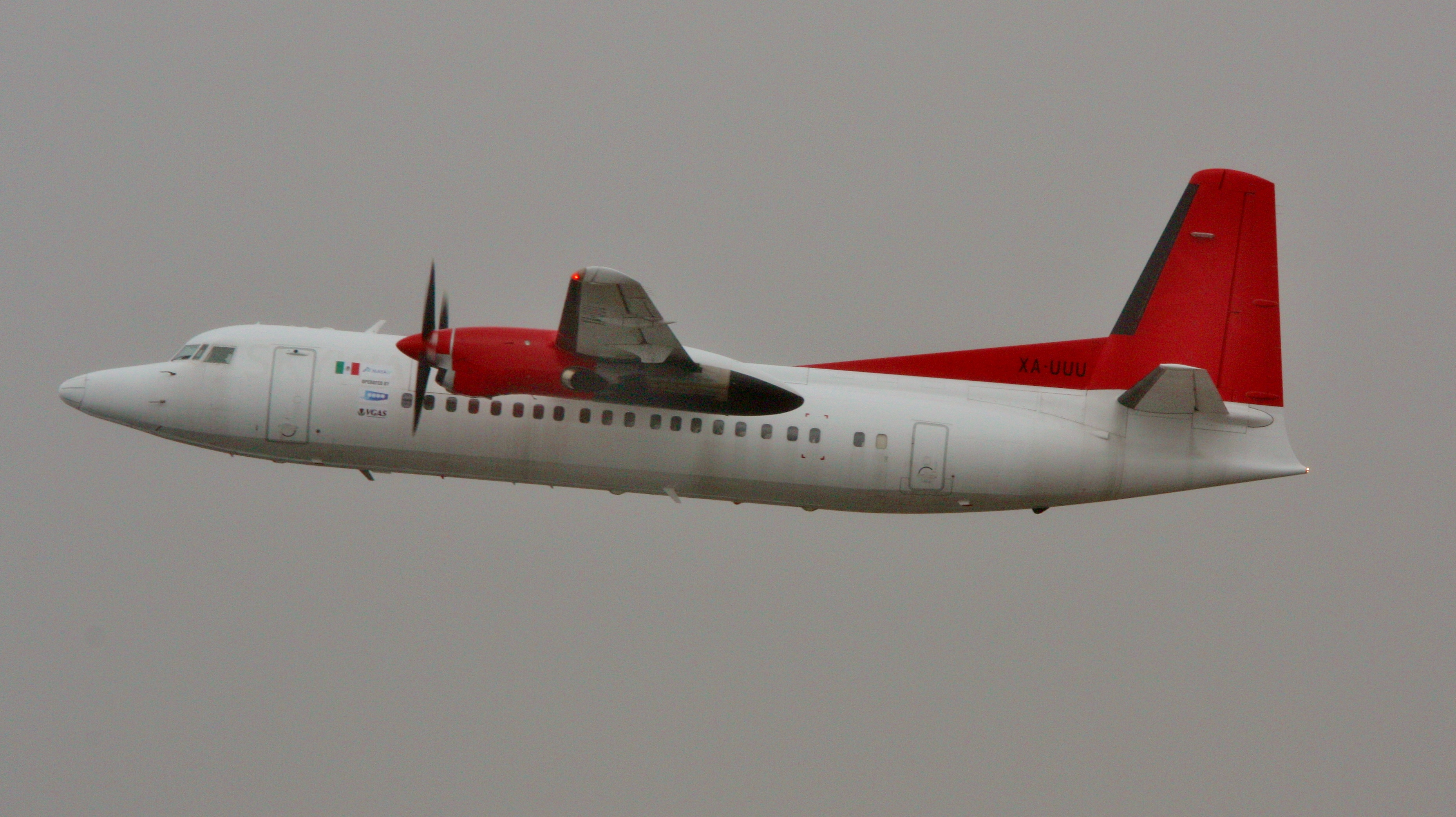 Departing Sumburgh